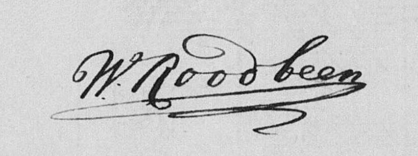 Gelders Archief, geboorteaktes, 30 april 1816